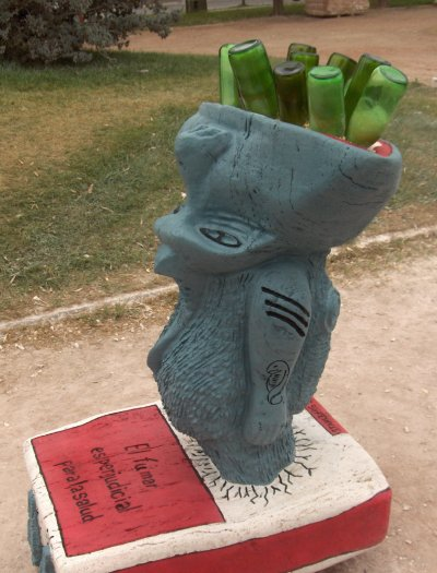 Skulptur "still me" , geschaffen 2008